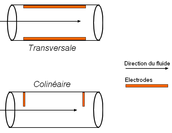 Configurations principales possibles pour un appareil de chauffage ohmique.